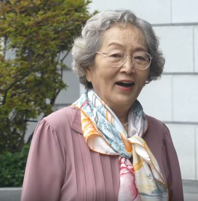 7월 13일 오후 서울시 영등포구 여의도 KBS 별관에서 '해피투게더4' 녹화가 진행됐다. 이날 녹화는 '디어 마이 프렌즈 특집'으로 김영옥X나문희X박원숙X고두심과 MC 유재석, 전현무, 조세호, 조윤희가 출연한다.